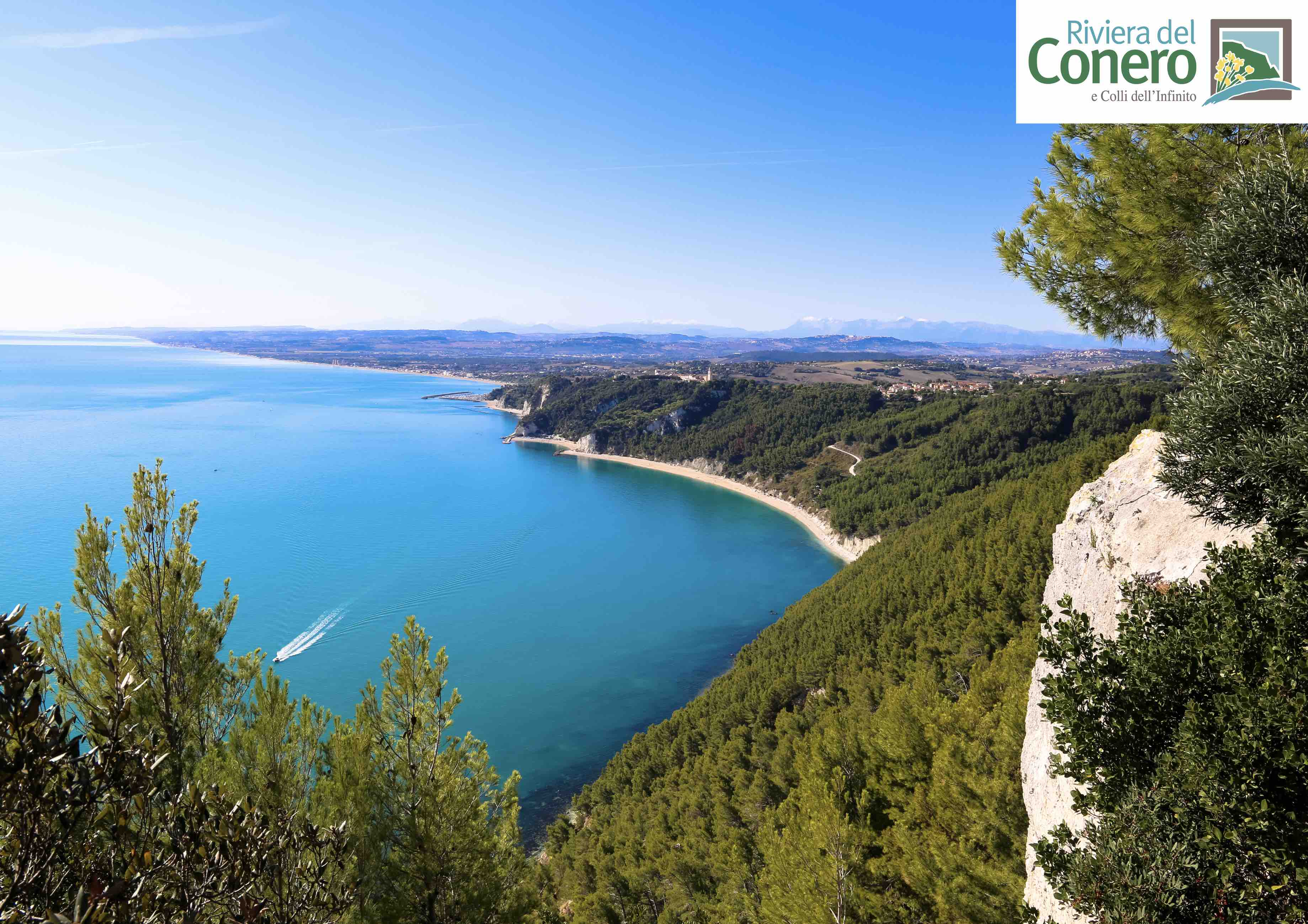 versante sud della Riviera del Conero